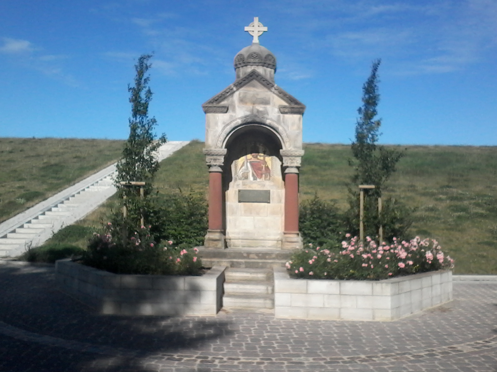 Monumento al Karolo la Granda en Rechtenfleth (stato: 2013-08-11)